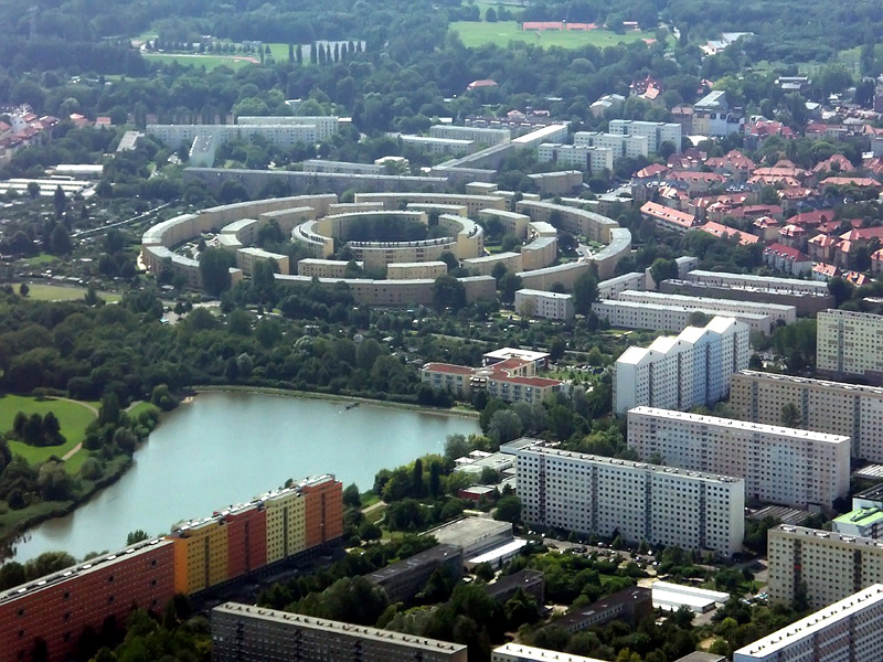 Leipzig-Lößnig mit Stauteich und Rundling